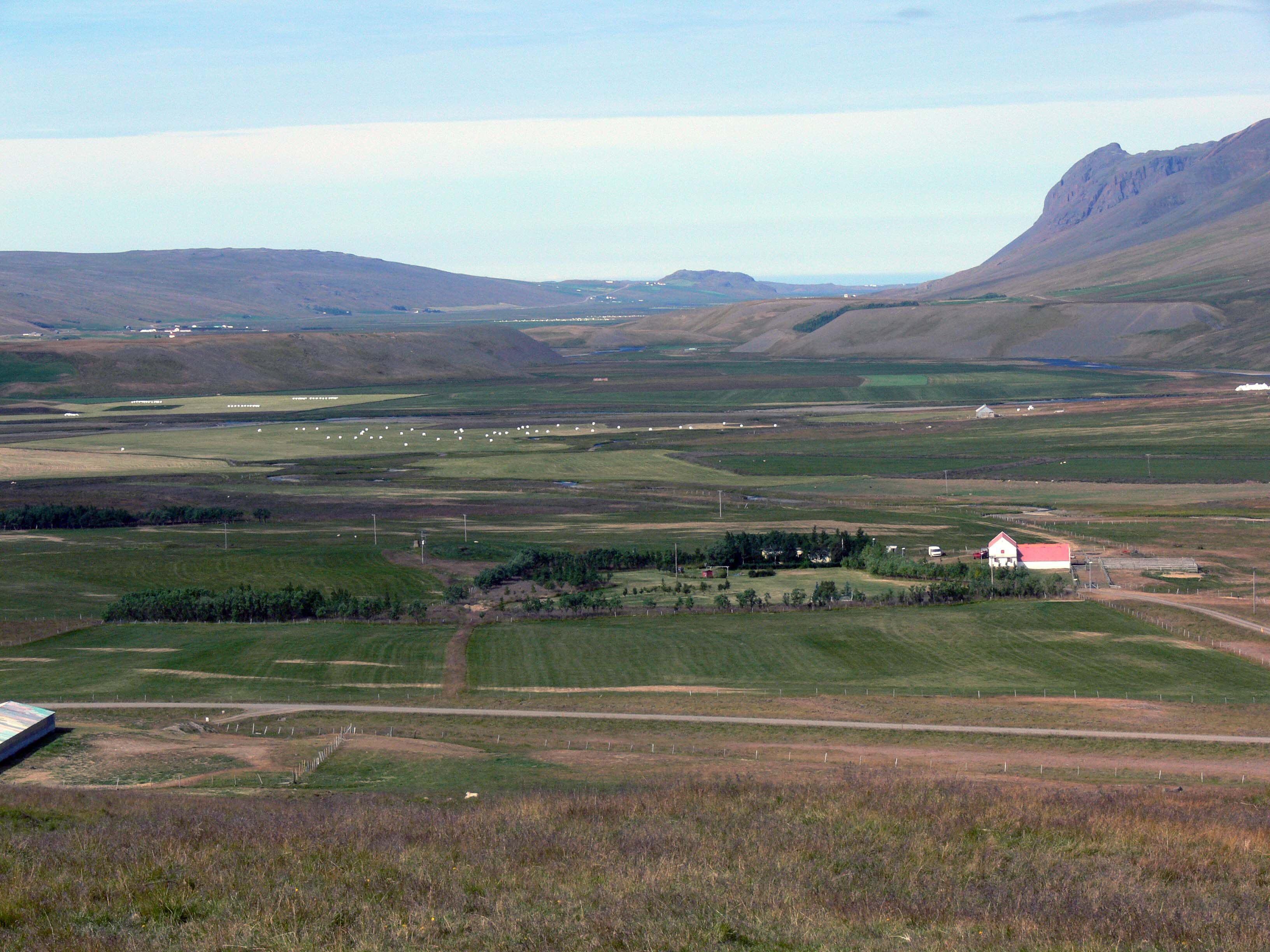 Vatnsdalur. Hier am Ende des Tals soll nach der Vatnsdæla saga der Landnámsmann Ingimundur seinen Sohn Jökull angesiedelt haben. Dieser konnte von hier das gesamte Tal überblicken und kontrollieren.